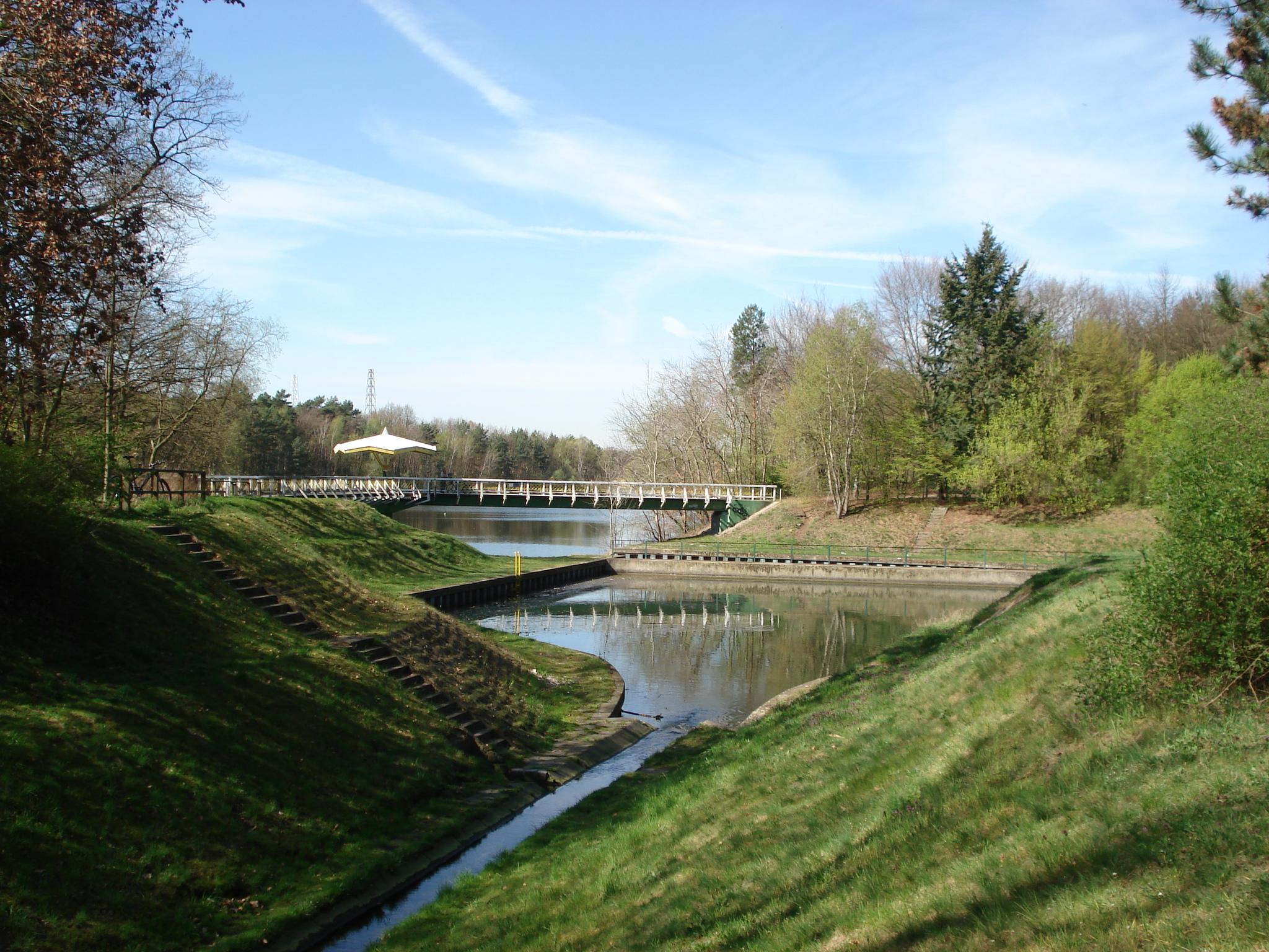 Flughafensee in Berlin Reinickendorf (Tegel), im Vordergrund: Schwarzer Graben, Seidel-Kanal fließt ins Absetzbecken, im Hintergrund: Fußgängerbrücke mit Aussichtsplattform